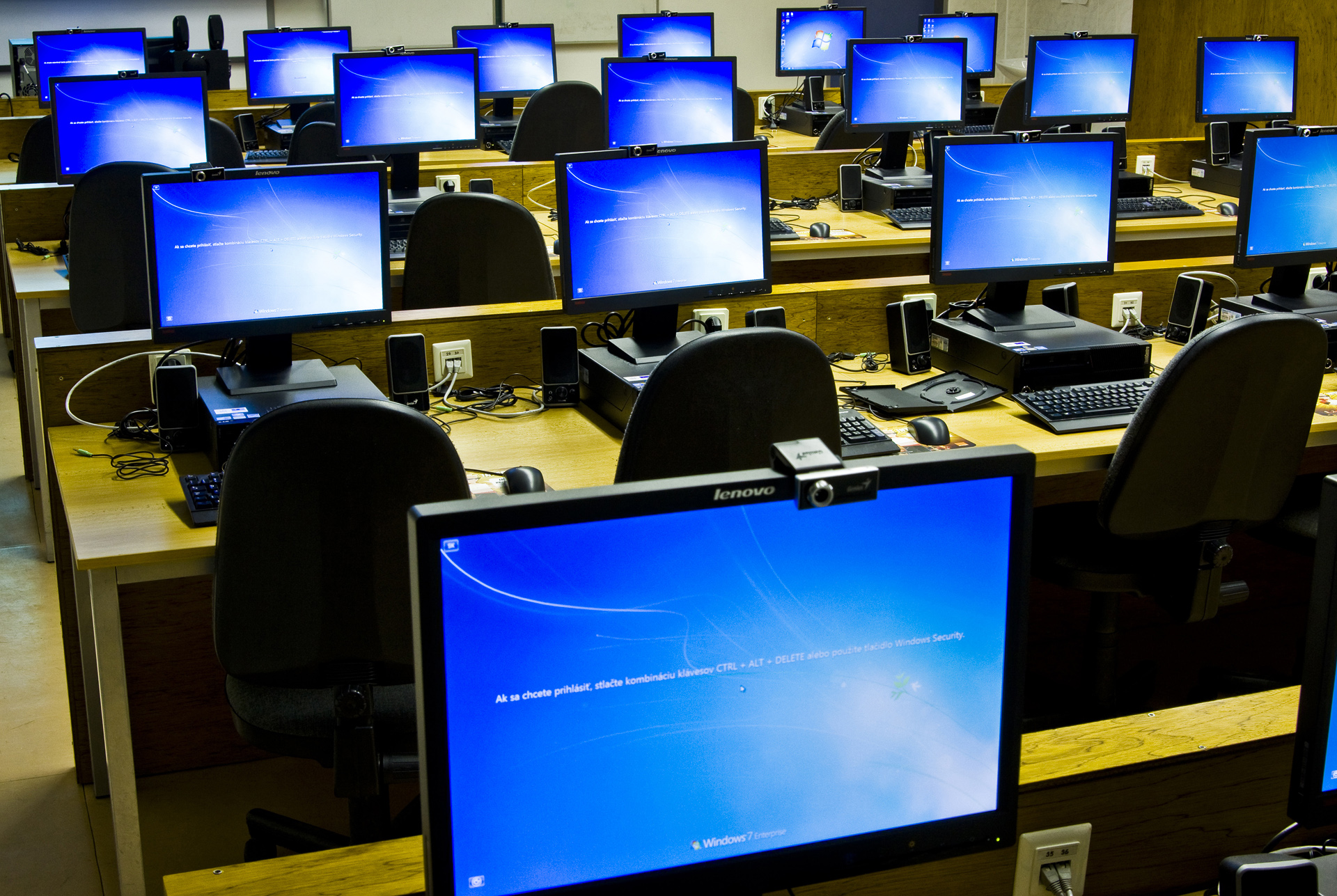 počítačové laboratórium PF PU